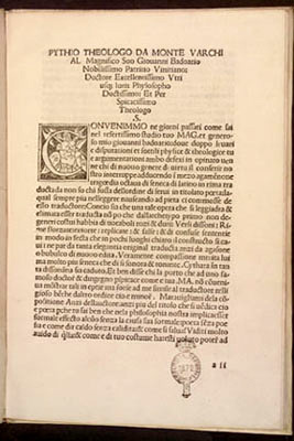 Seneca's Hyppolitus, in Pizio da Montevarchi's translation.